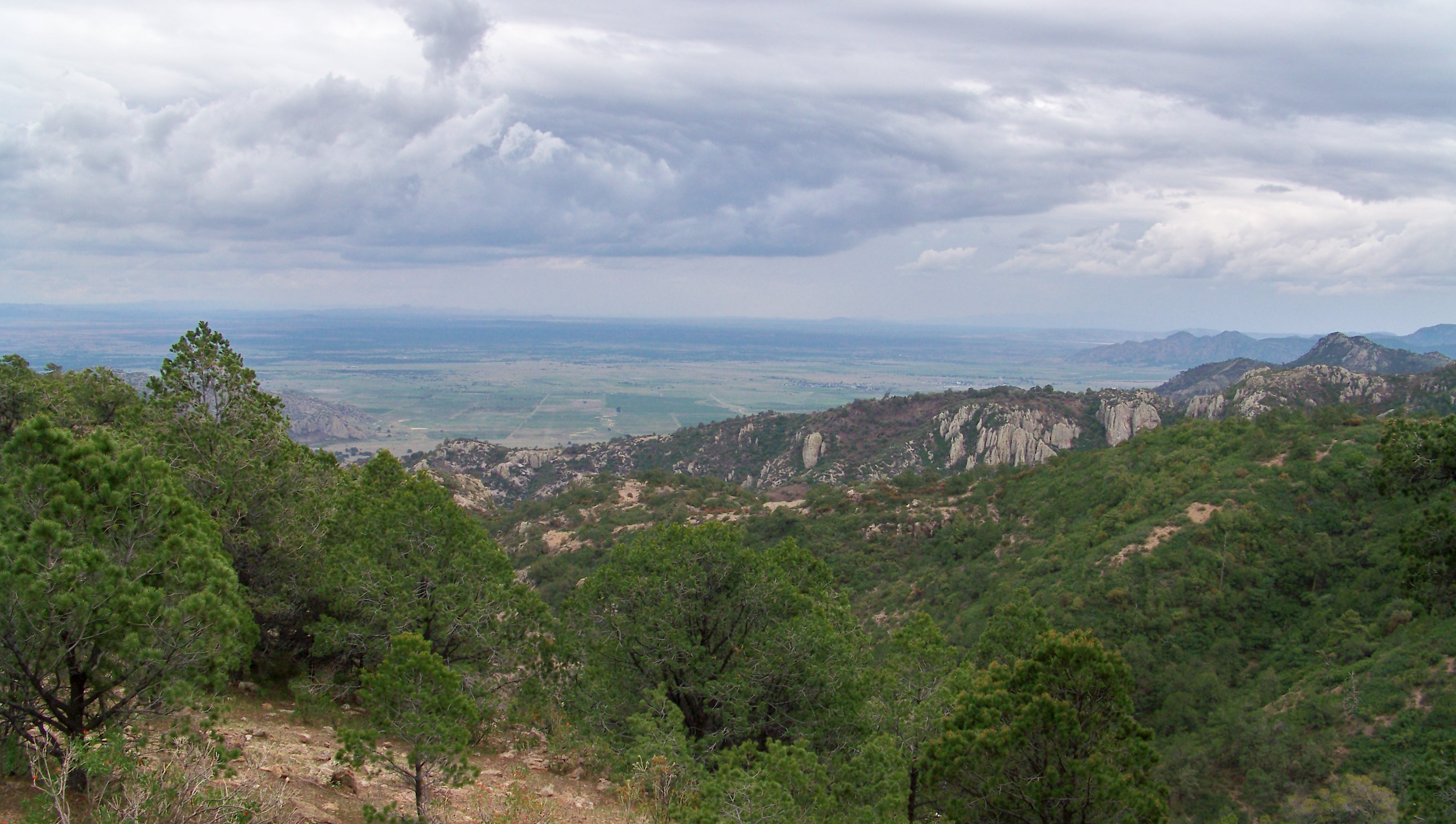 Canatlán Municipality, Durango, Mexico